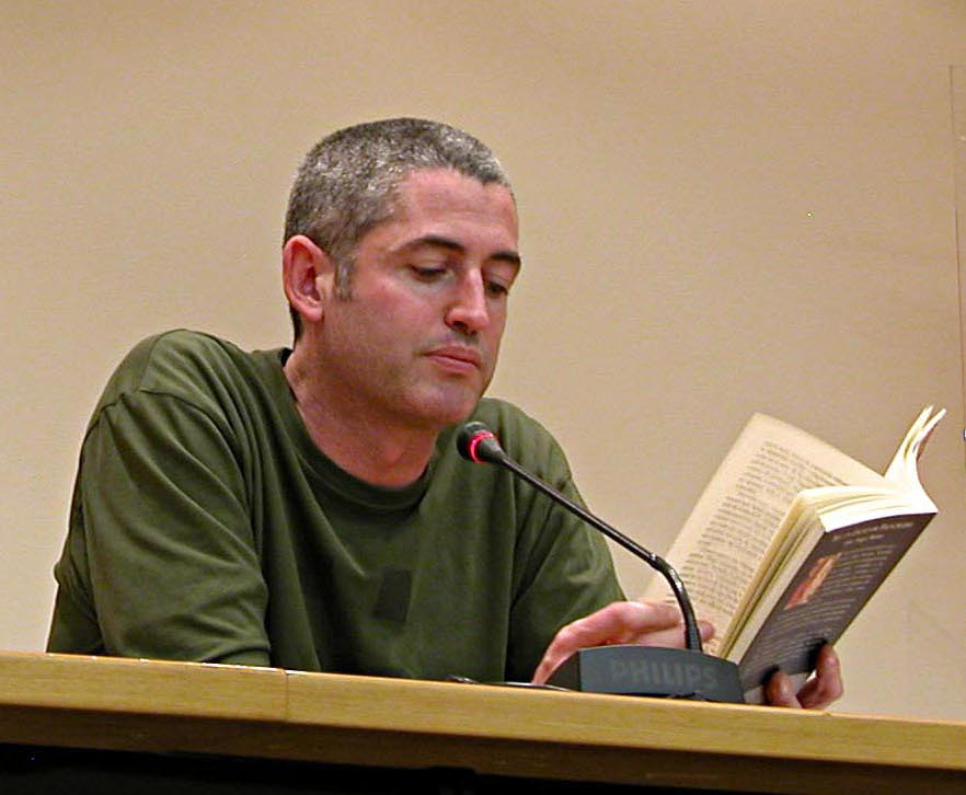 José Ángel Mañas pronunciando una conferencia en la Universidad de La Rioja (16 de noviembre de 2006)